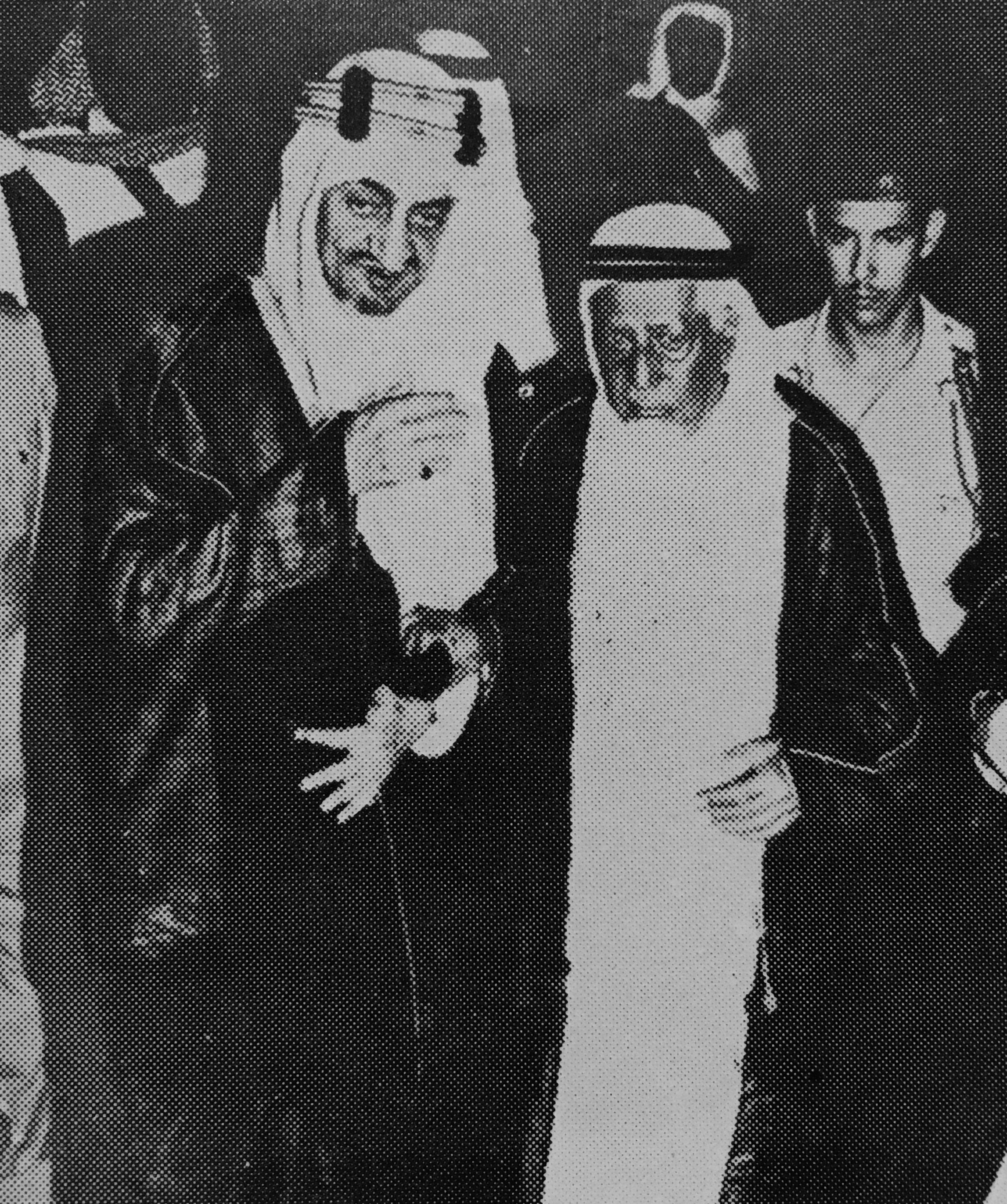 رئيس عين العزيزية الشيخ عثمان باعثمان باعشن يتحدث مع صاحب الجلالة الملك فيصل ال سعود